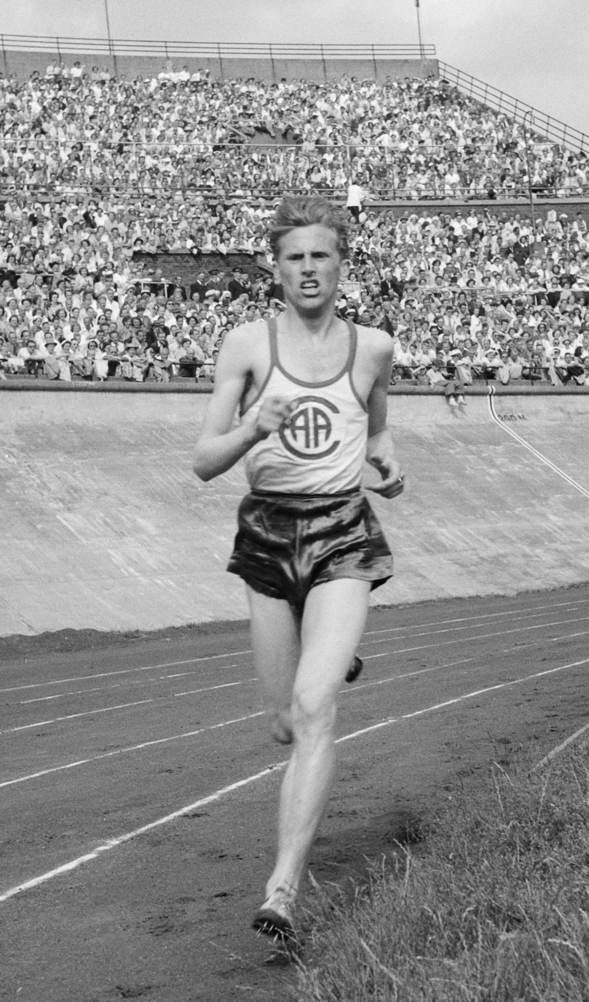 Hans Harting wint de 1500 m op de Olympische Dag 1951 in het Olympisch Stadion in Amsterdam